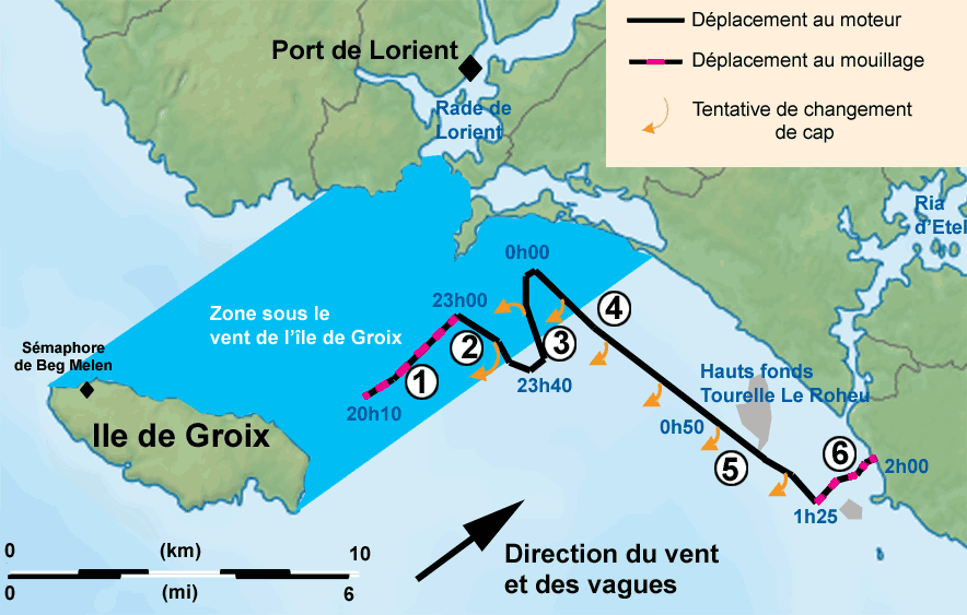 Trajectoire suivi par le TK-Bremen avant son échouement